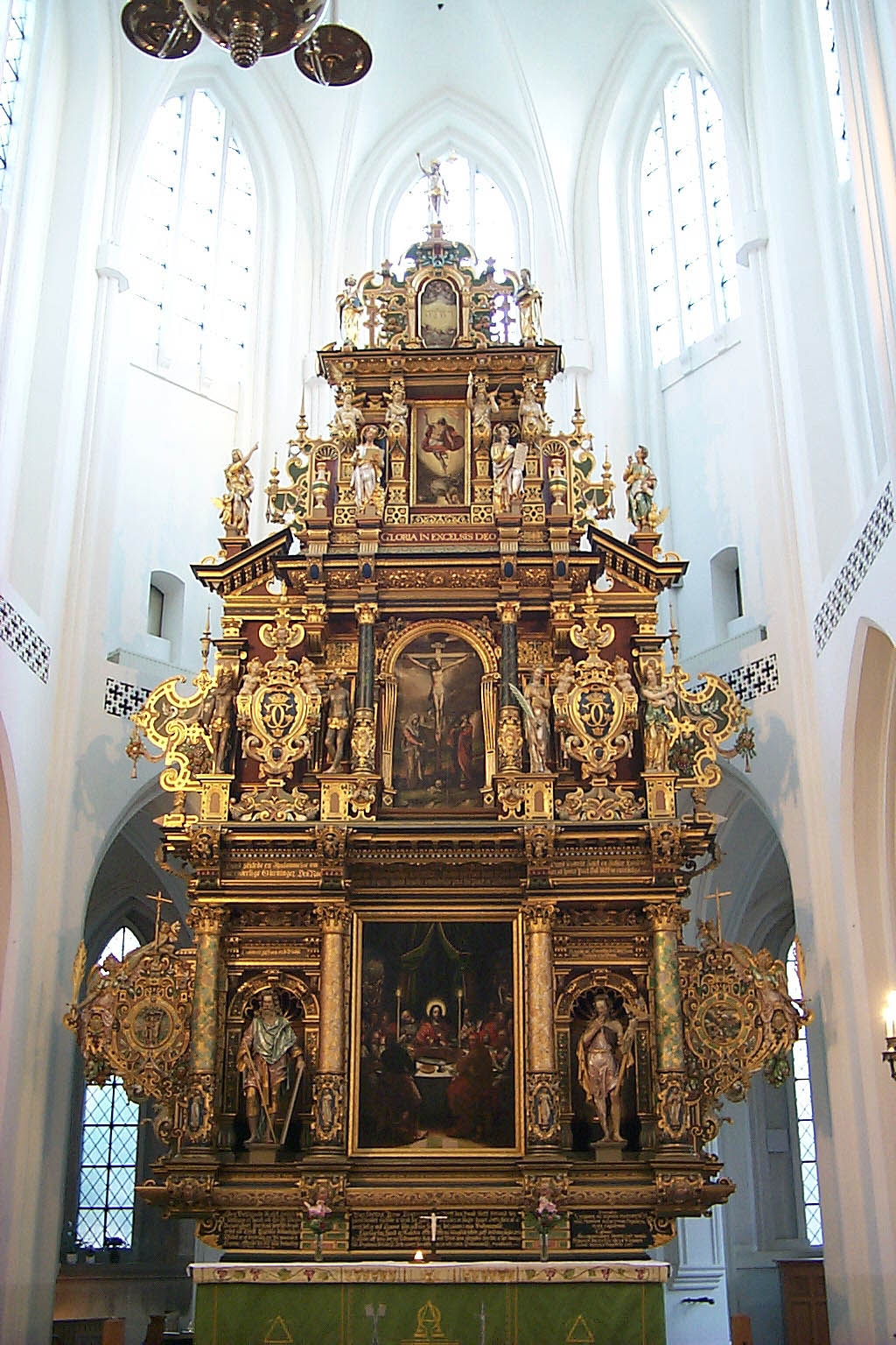 S:t Petri kyrka i Malmö. Altaruppsatsen från 1611.